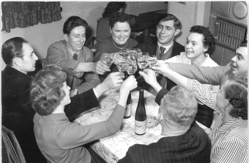 Feier in einem Kulturhaus Zentralbild Weiß 11.2.1959 Traktoristen kämpfen um den Titel Brigade der sozialistischen Arbeit (siehe Begleittext). UBz: Oftmals kommen die Kollegen der Jugendbrigade mit ihren Ehefrauen im Kulturhaus der MTS zusammen, um den Feierabend gemeinsam zu verbringen. Dabei werden viele Fernsehsendungen angesehen und nachdem entwickelt sich nicht selten eine lebhafte Unterhaltung über das Gesehene. Hier einige Traktoristen mit ihren Frauen in gemütlicher Runde.